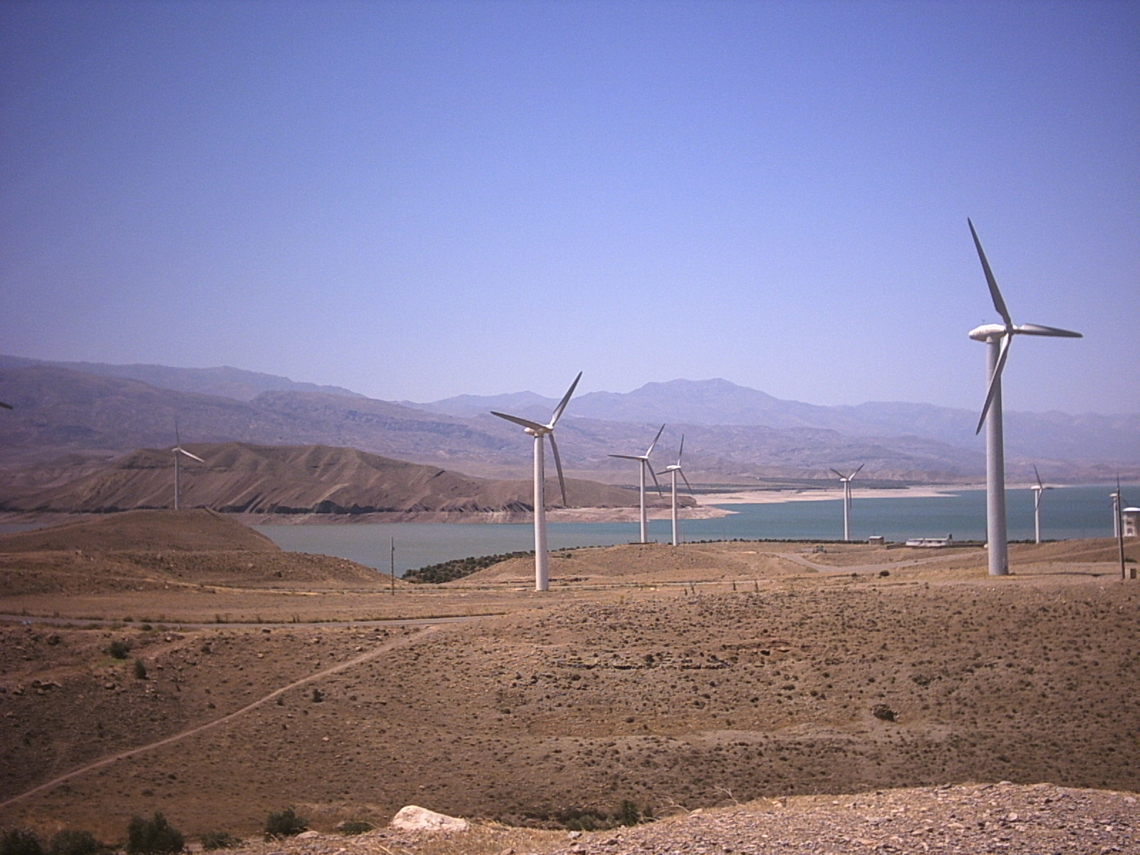 آسیاب‌های بادی منجیل